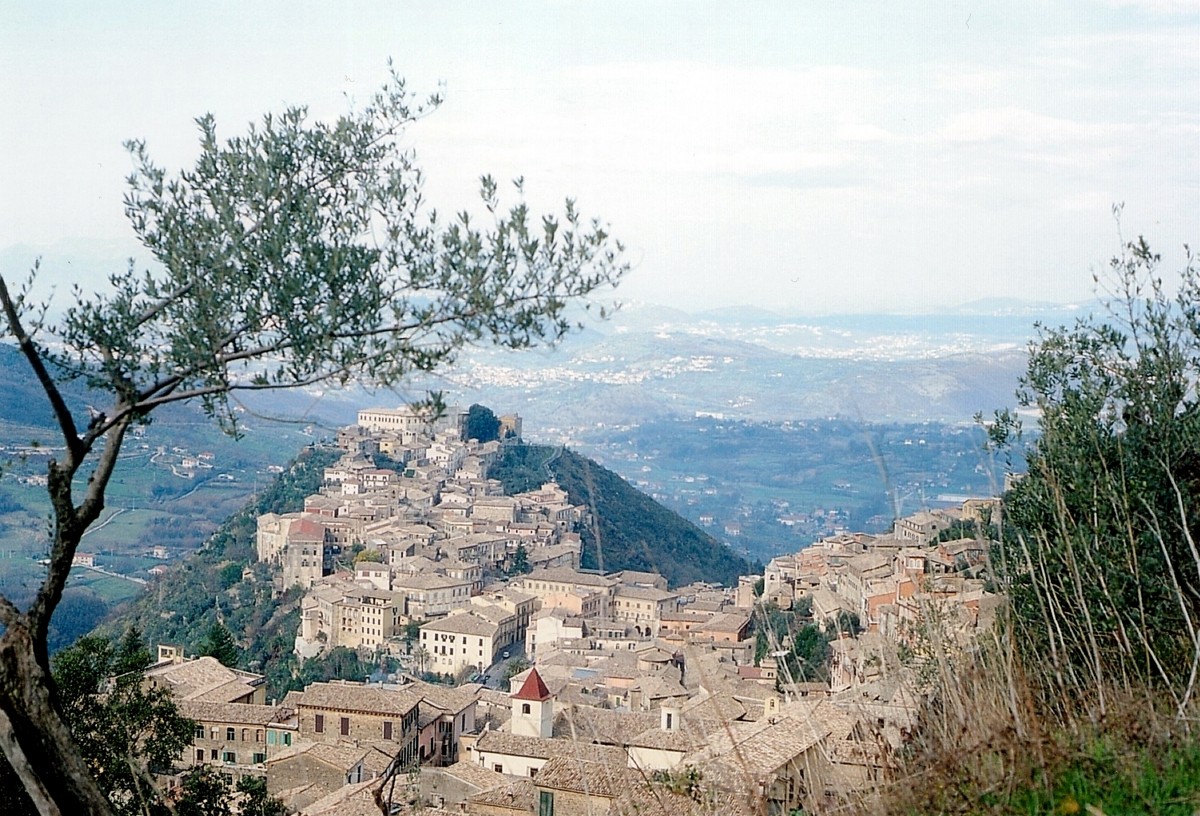 Panorama di Arpino vista dall'acropoli